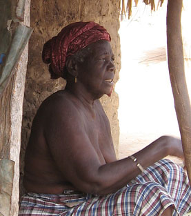 Femme sérère dans un village du Siné Saloum, Sénégal